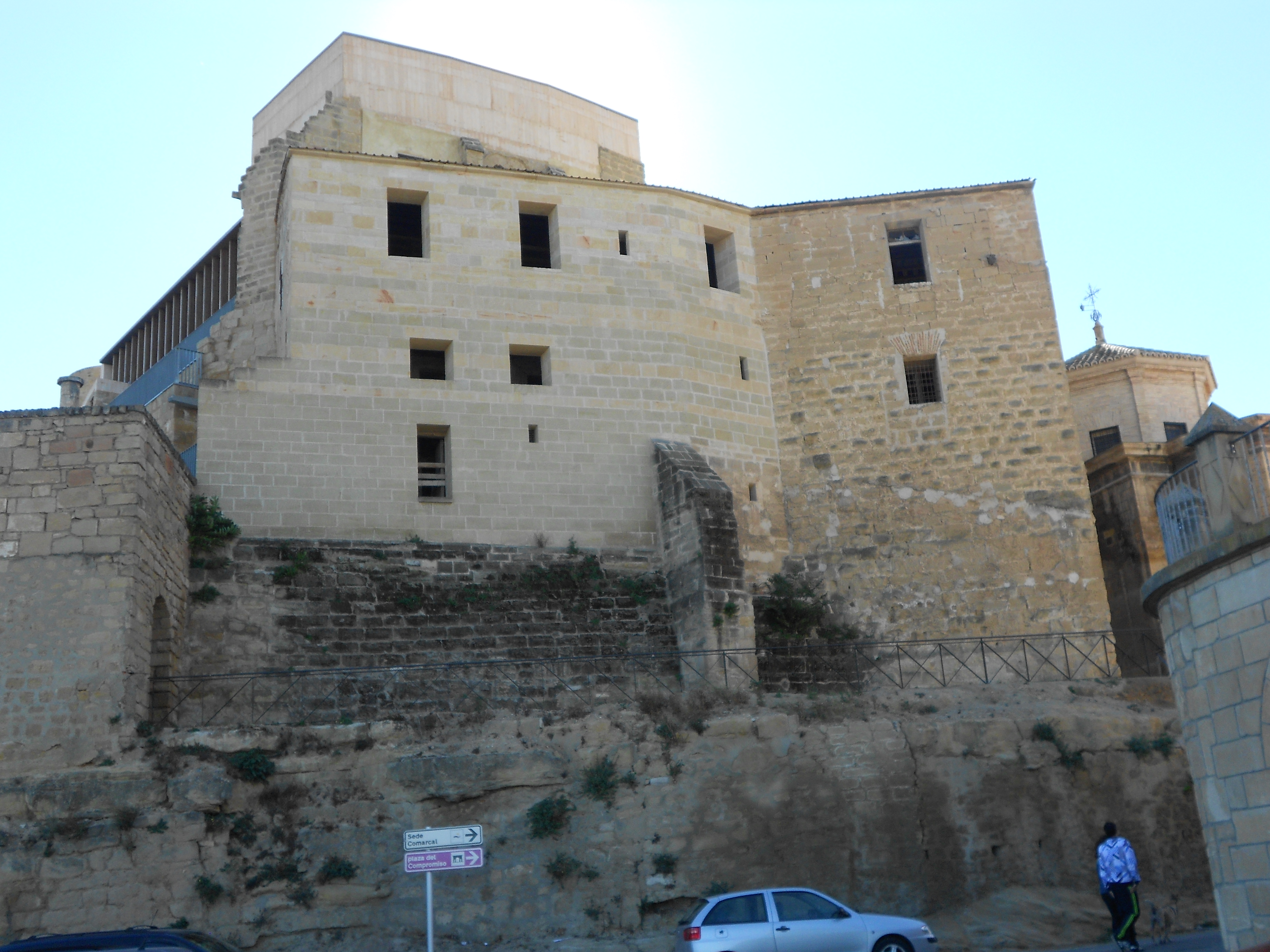 Castillo del Compromiso (Caspe, Aragón)